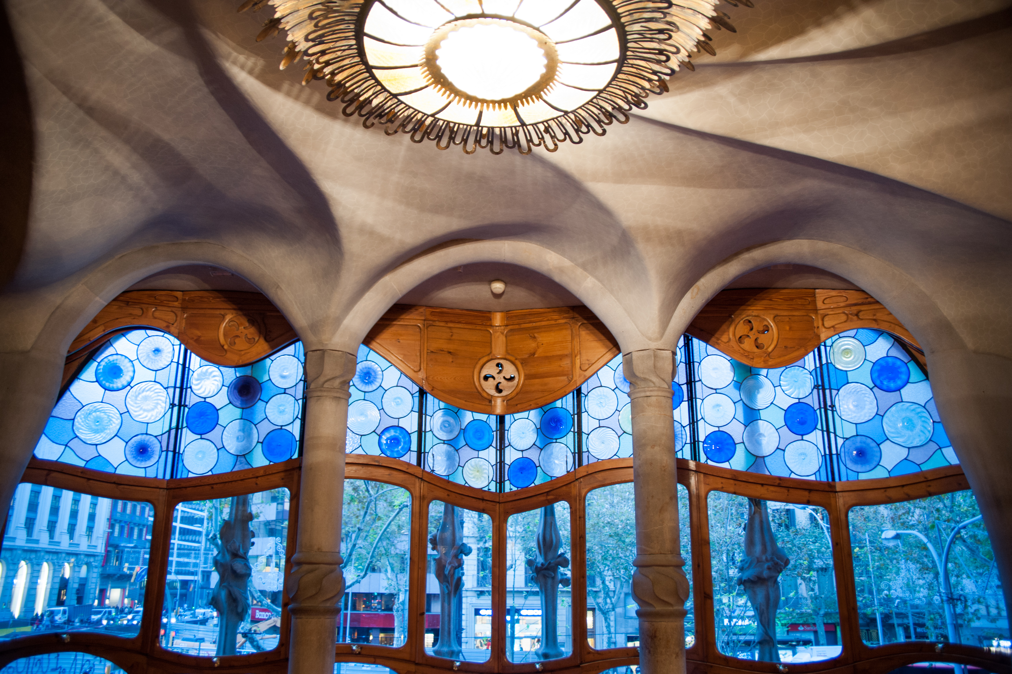 Casa BatllГі (Antoni Gaudi) (interior), 43, Passeig de GrГ cia, Eixample, Barcelona, Catalonia, Spain.